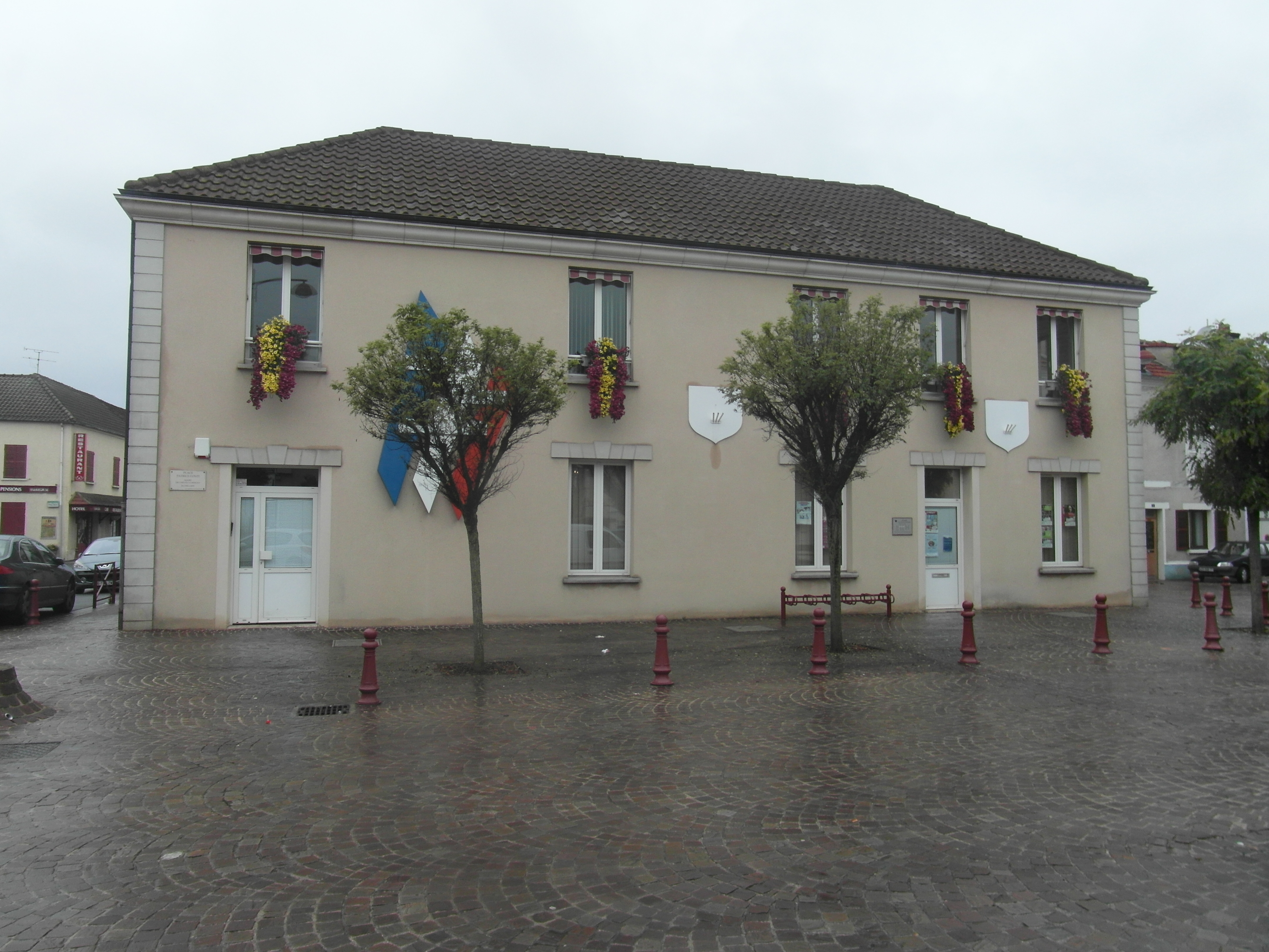 Mairie de Chevry-Cossigny (Seine-et-Marne)